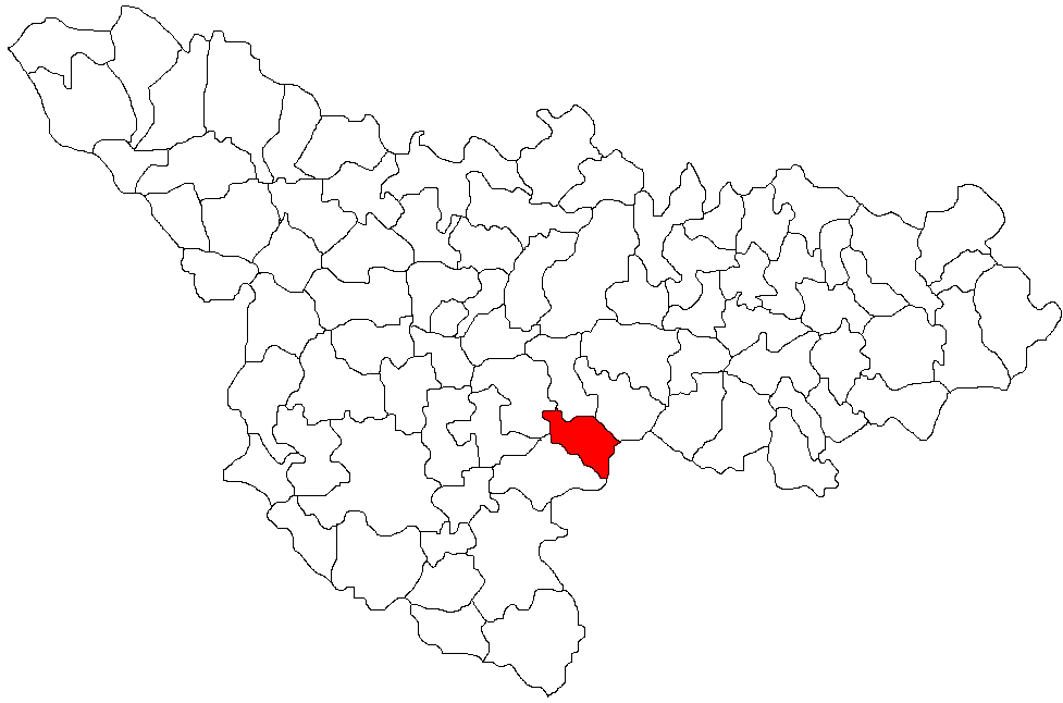 Categorie:Hărţi ale judeţului Timiş